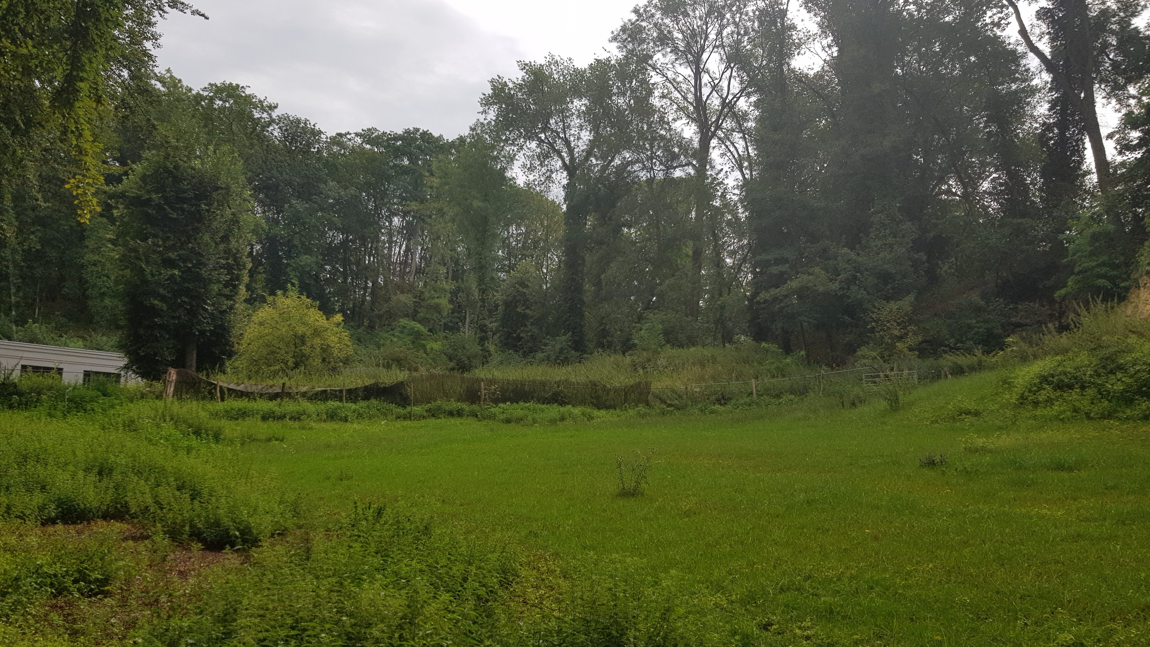 Oude Groeve Sint-Joseph, Cadier en Keer, Nederland